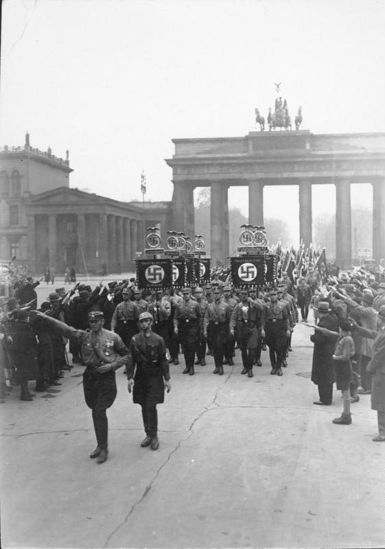 Einzug der Amtswalter durch das Brandenburger Tor